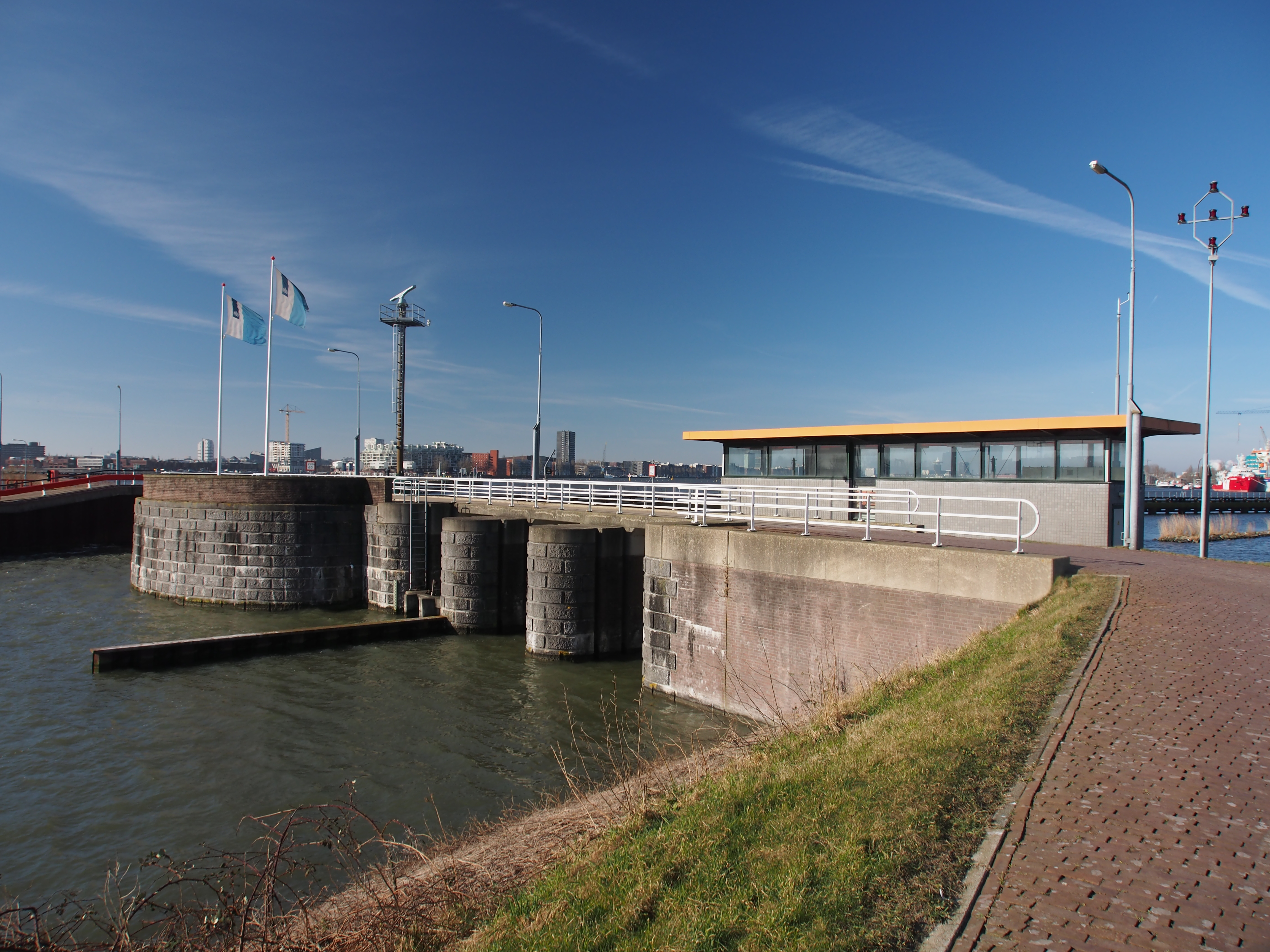 Oranjesluizen, Amsterdam.